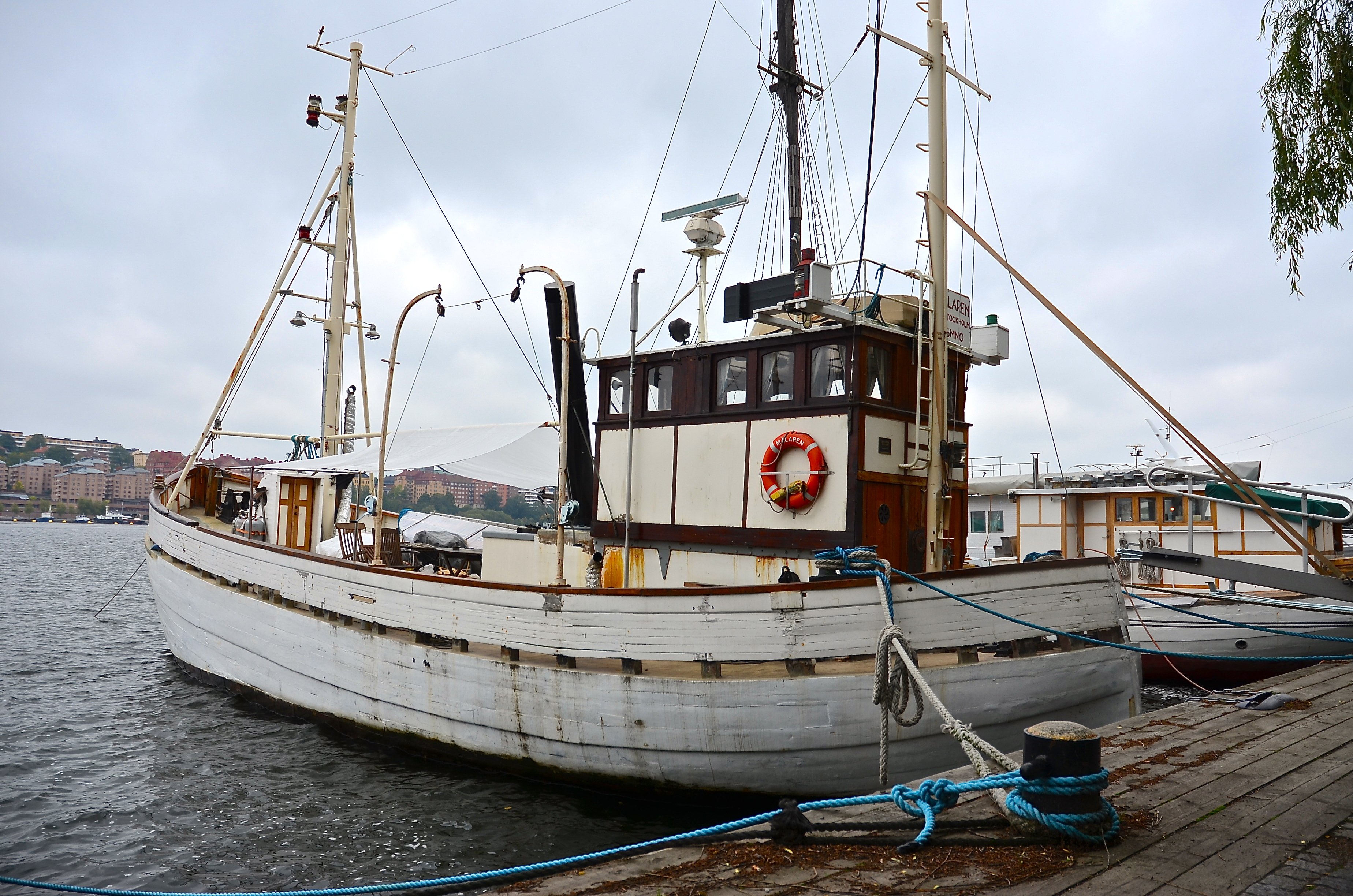 Fiskebåten Mälaren vid kaj på Norrmälarstrand i Stockholm This is an image of the protected Swedish ship Fiskebåten Mälaren, with call sign SMNO .